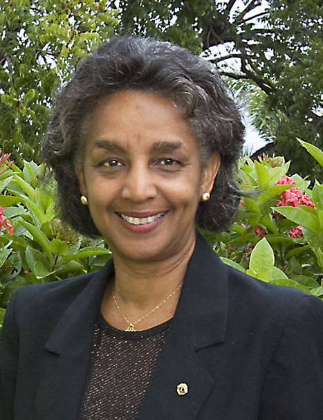 Boekuitreiking aan PLV.Gouverneur